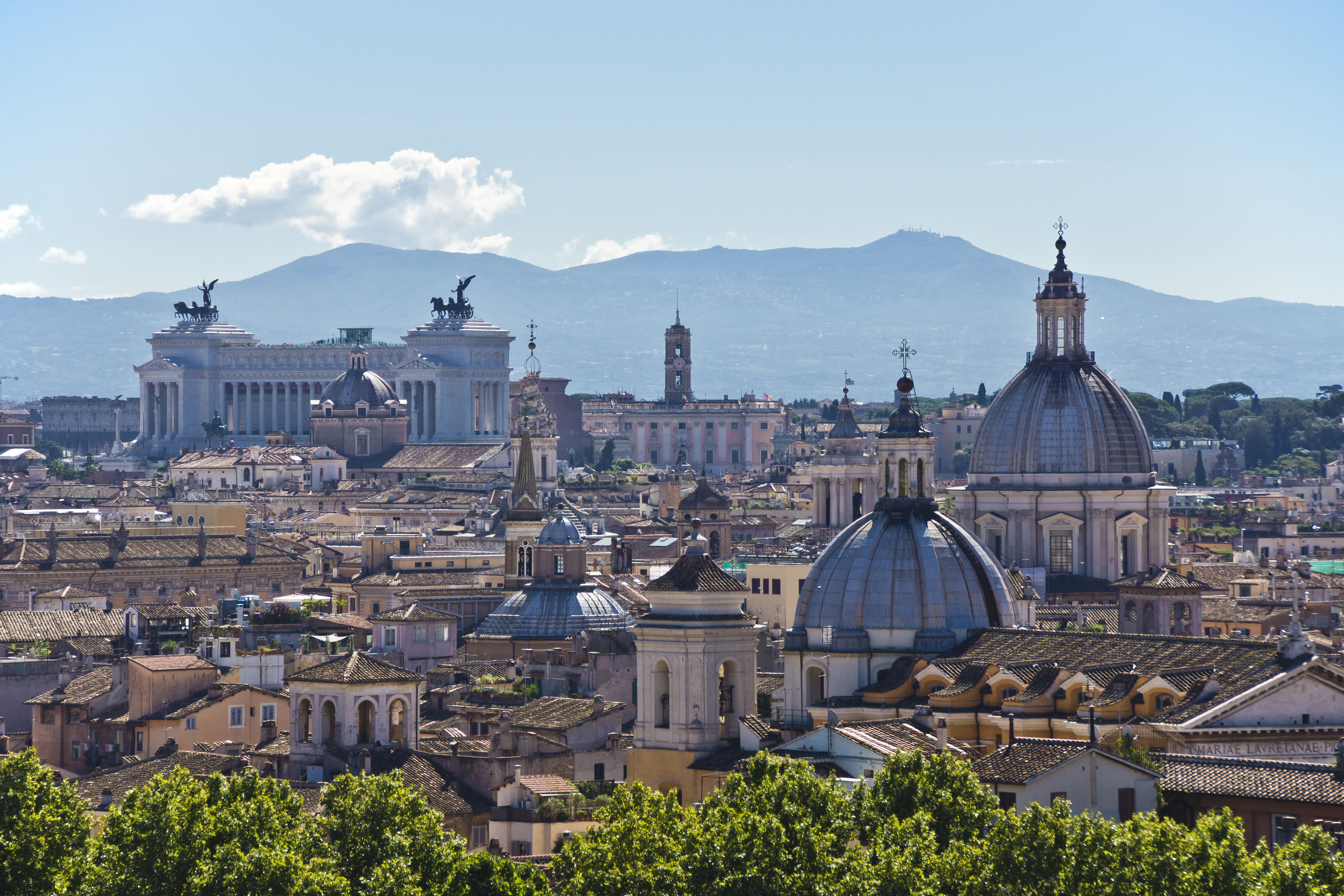 Roma / Rome - Lazio - Italia / Italy